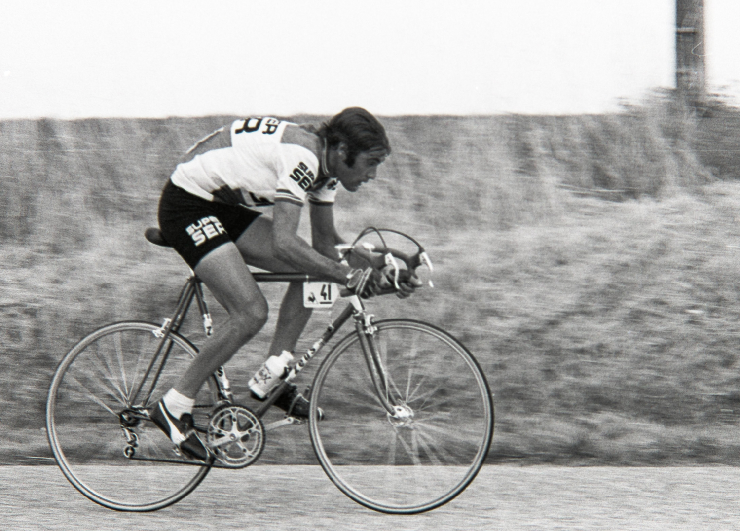 Luis Ocaña durant le Tour de France 1976. Photographie : René Milanese